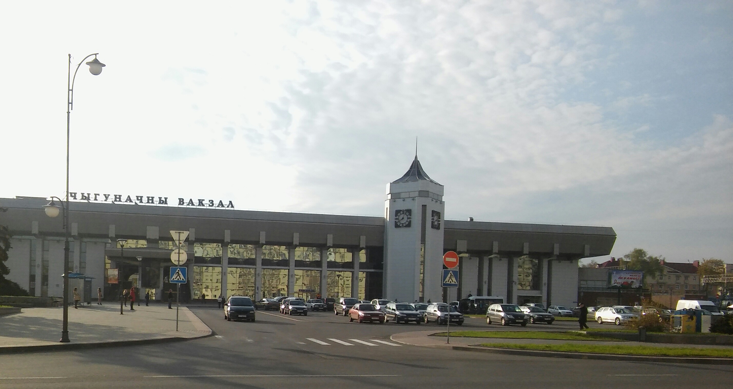 Вокзал Гродно сегодня